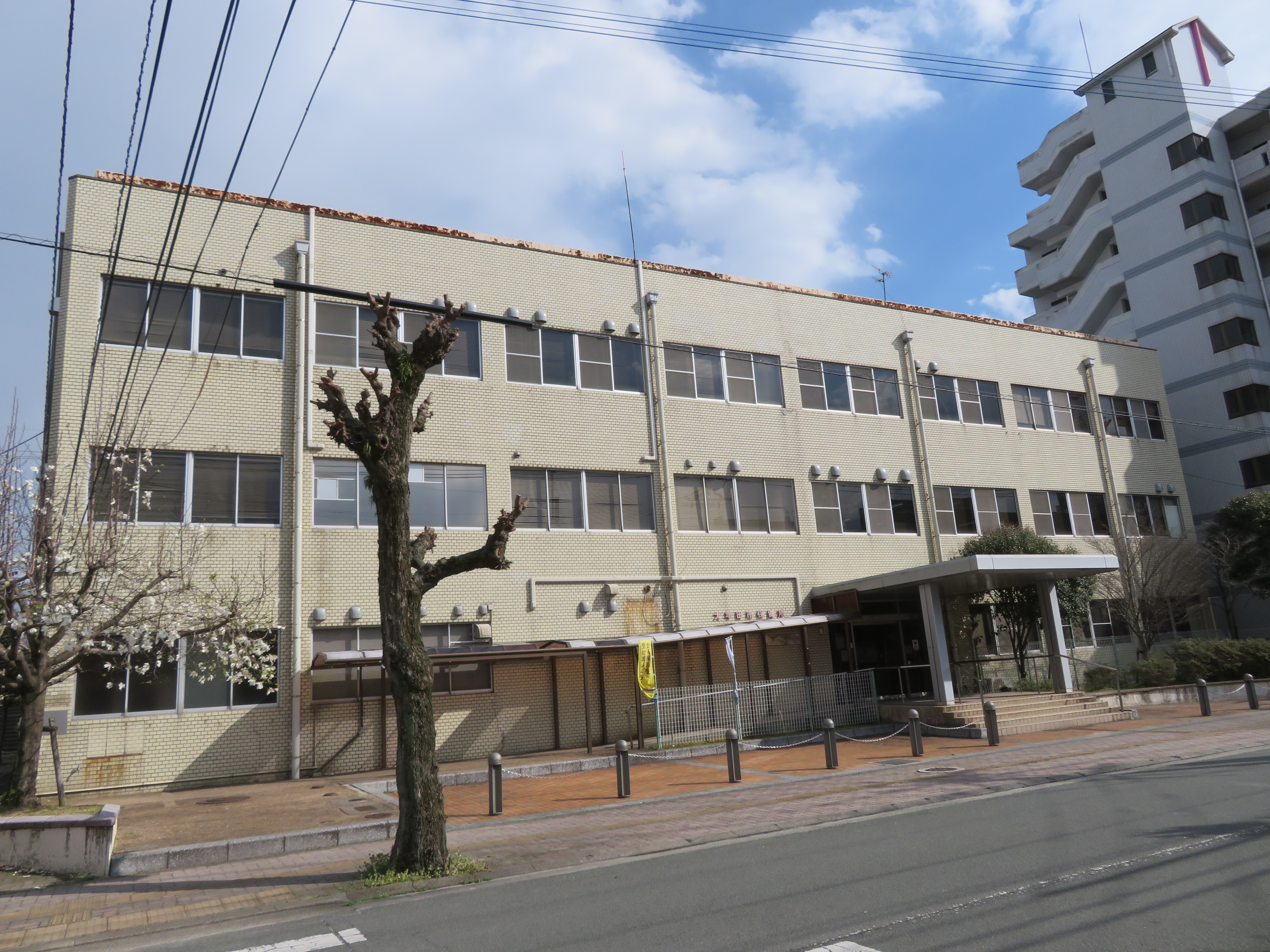 福岡県大牟田市に所在する大牟田市保健所庁舎 Canon PowerShot SX720 HS